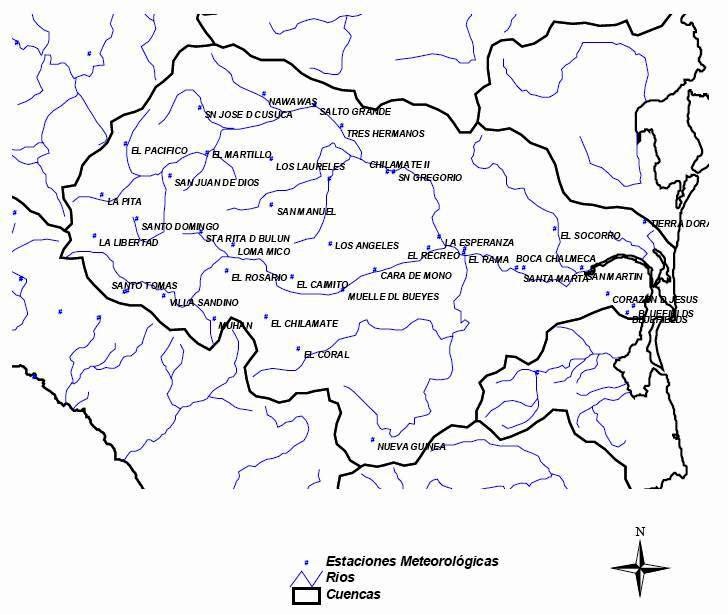 Cuenca Rio Escondido MARENA